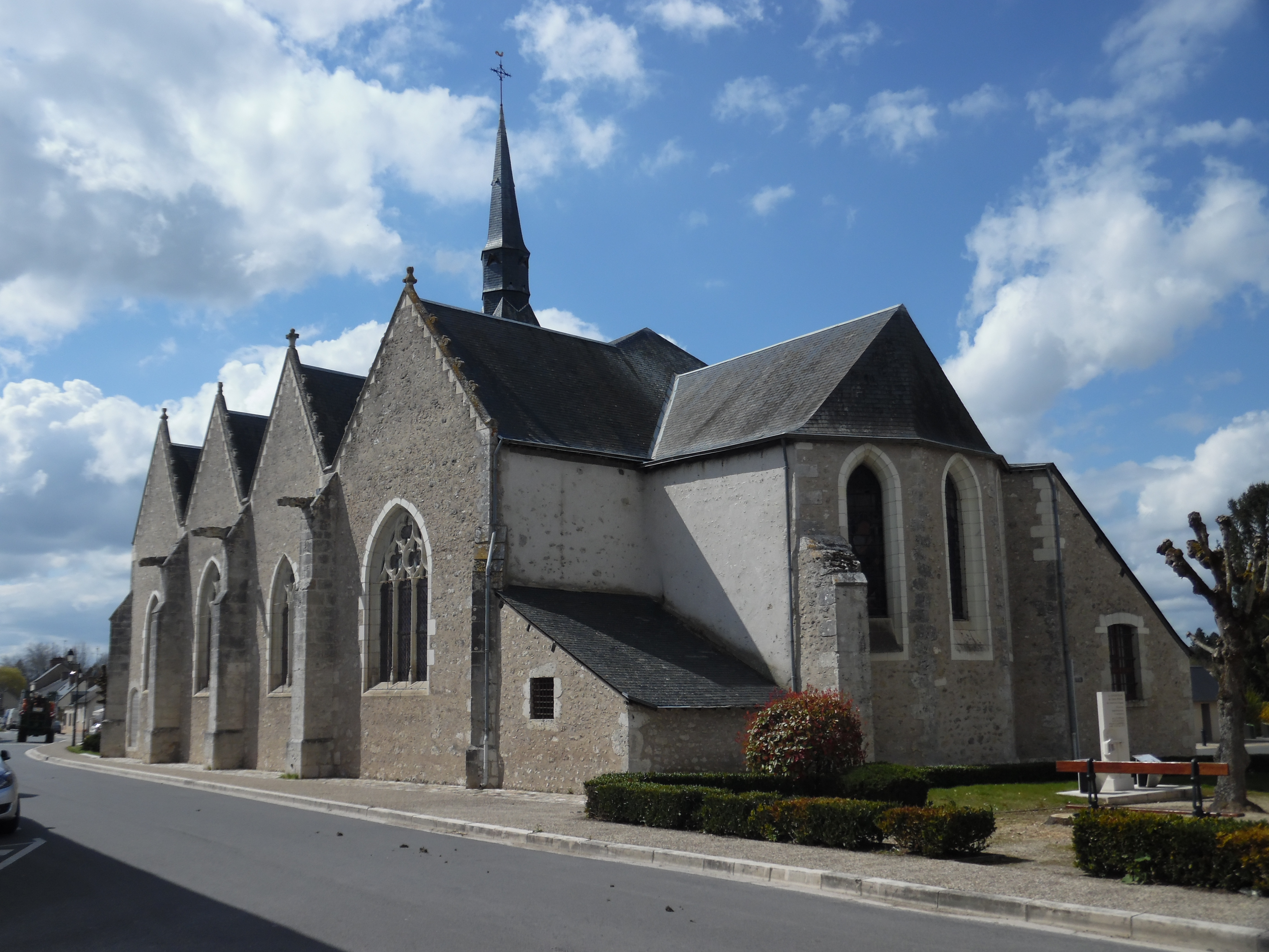 Vue de l'extérieur de l'église Notre-Dame de Chitenay